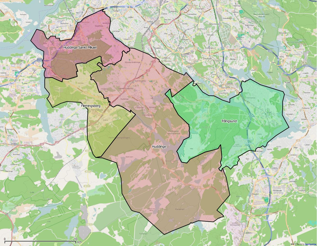 Distriktsindelningen i Huddinge kommun